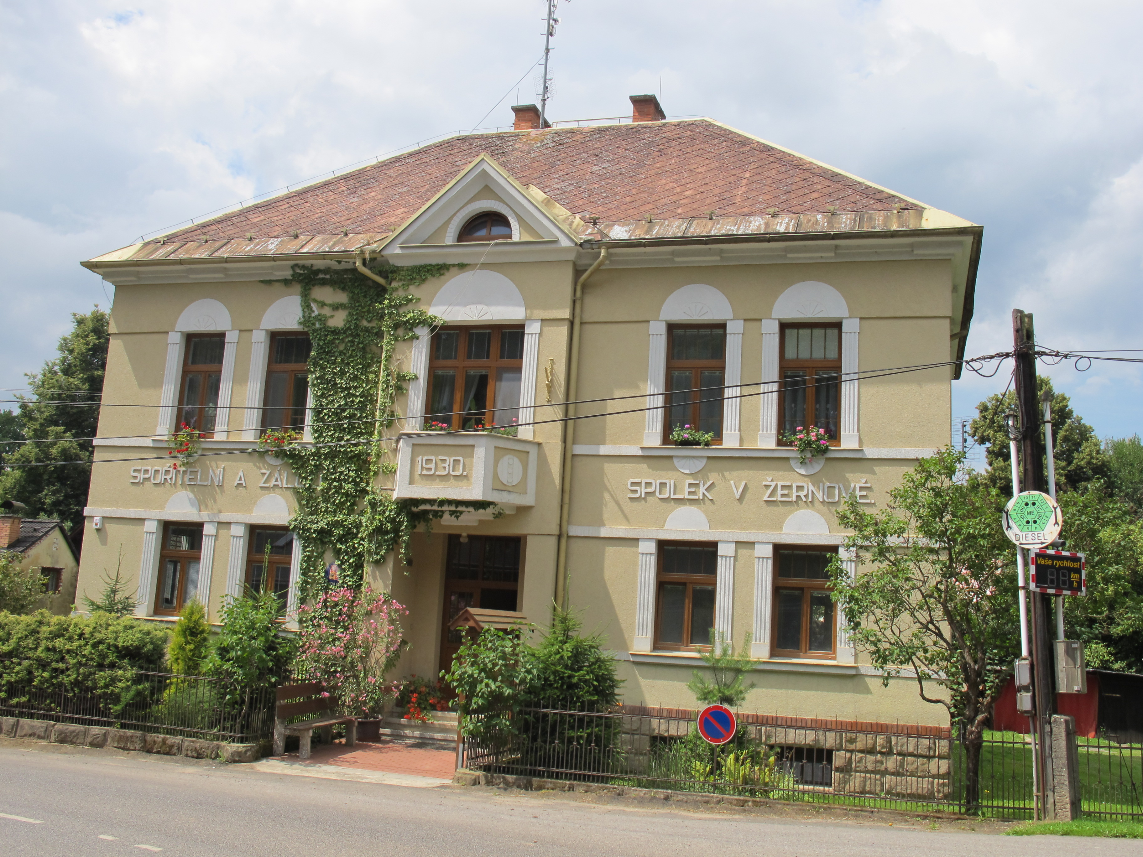 Žernov v okrese Semily - obecní úřad